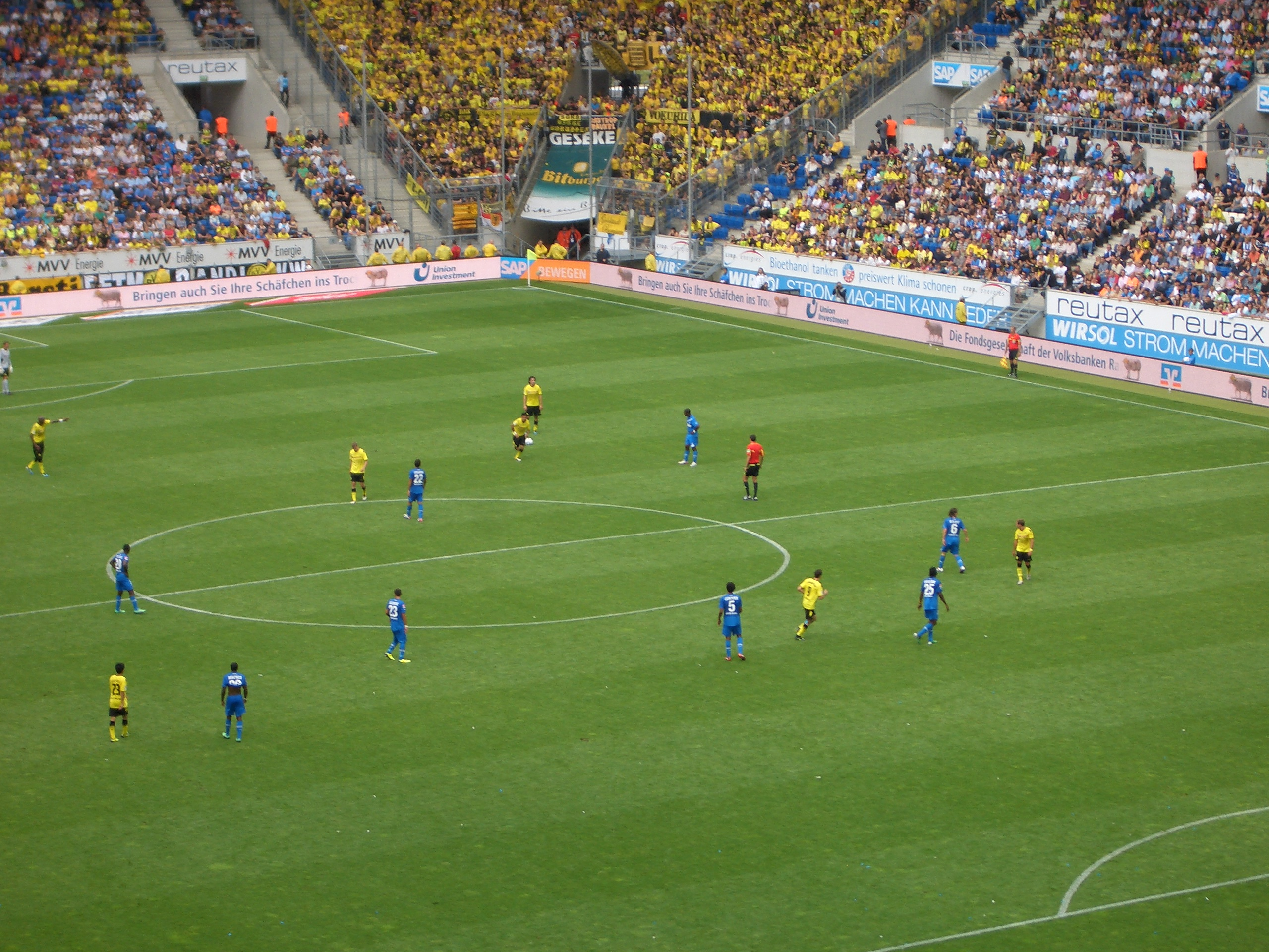 Hoffenheim against Borussia Dortmund in August 2011.